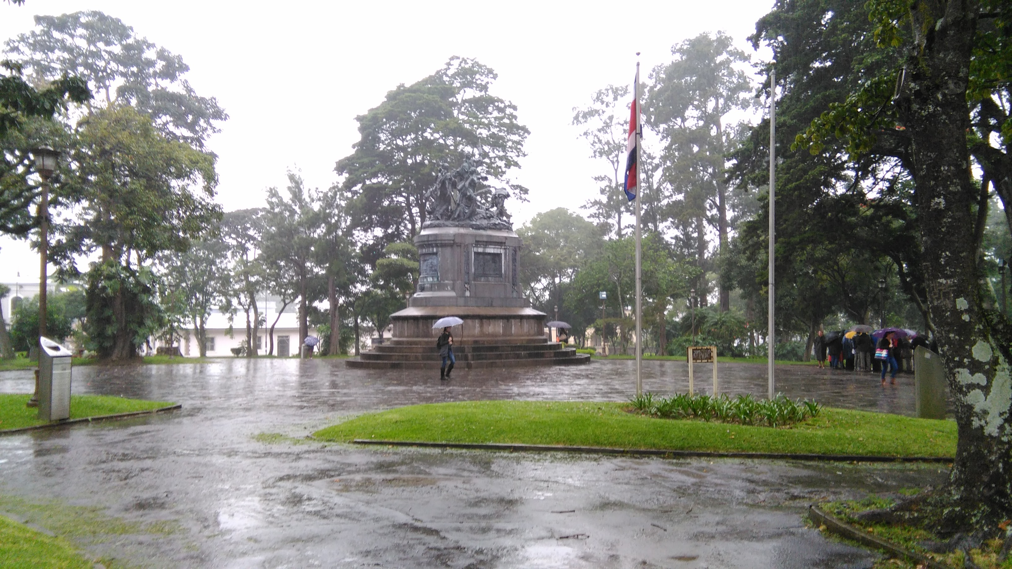 Parque Nacional de San José, Costa Rica.